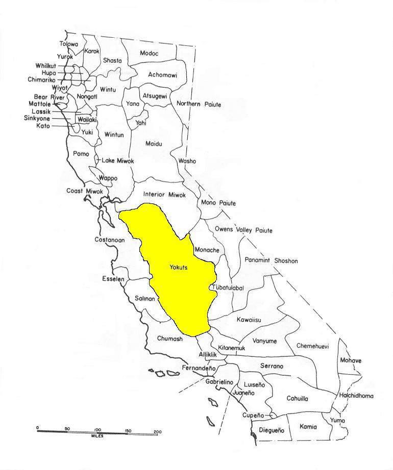 Населяване територия от племе Йокути